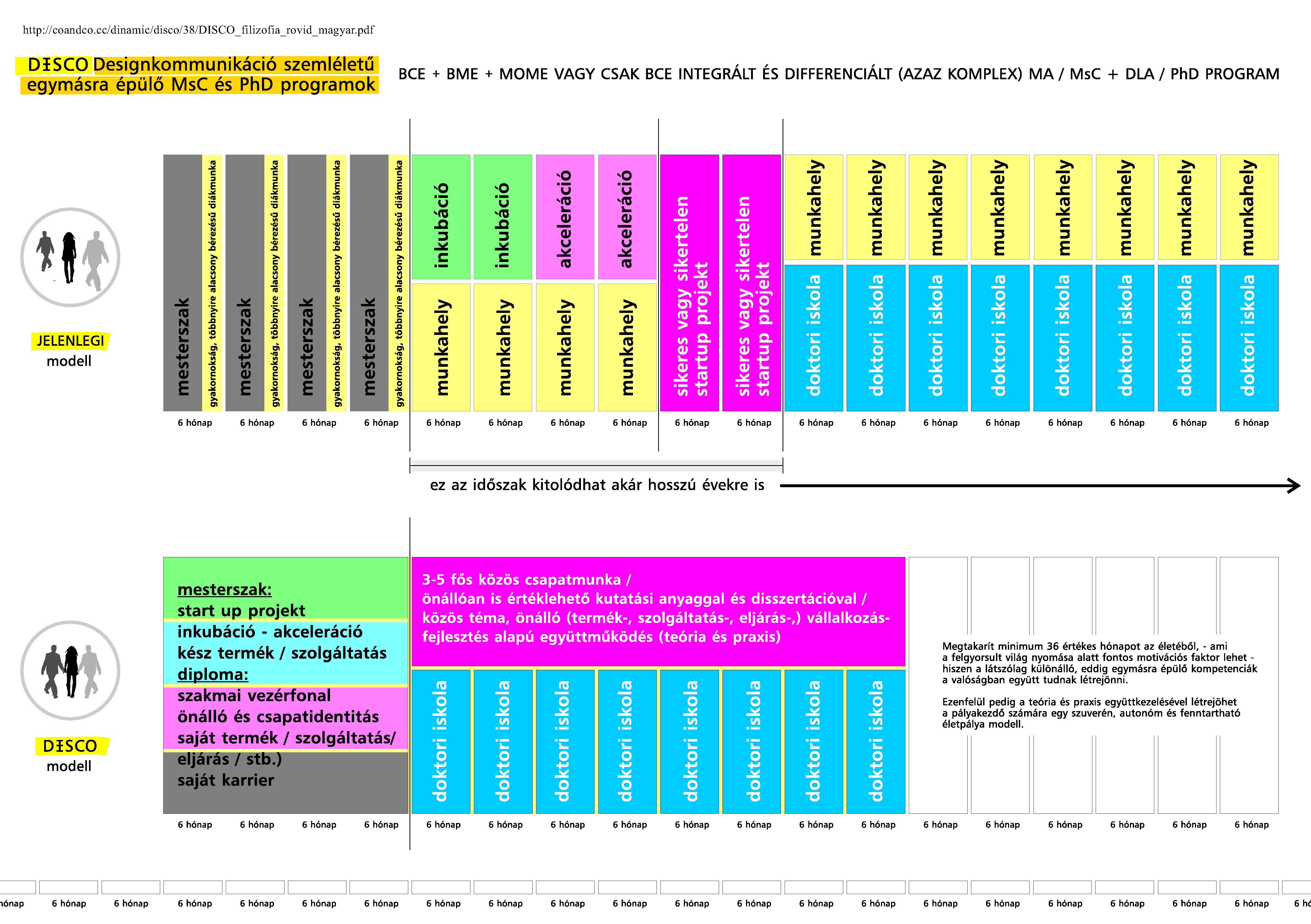 A DESIGNKOMMUNIKÁCIÓ egy olyan kapcsolatteremtési szemléletet képvisel amely HÍD-ként jelenik meg a különböző diszciplínák és diskurzusok, a társadalom és a gazdaság jelenségei között. A módszerével valósidejű kapcsolatot lehet teremteni oktatás, kutatás és vállalkozás között. Számol az idő-faktorral mely túl erős, szerteágazó és objektívnek tűnő a digitális (majd várhatóan a) konceptuális kor kontextusában. Az IDŐ kíméletlenül befolyásolja életünket, de legfőképpen az Y és Z generáció számára okoz sokszor nehezen kezelhető problémákat. A multitasking generáció olykor túlzottan fájdalmasan éli meg, hogy tanulnia kell a munka rovására és dolgoznia kell a tanulás rovására, hiszen az időfaktor - lássuk be - nem mindig multitasking kompatibilis. Célunk nem az, hogy a néha őrületbe kergető gyorsaságot fokozzuk, vagy kényszeresen lassítani próbáljuk azt, hanem a szakmai ÉLETPÁLYA optimalizálása (lsd. infógrafika), ahol nem teszünk minőségi különbséget differenciált és integrált gondolkodás között, ahol jut idő a tanulásra, a kutatásra, munkára (karrierre, vállalkozásra), az együttműködésre és a személyes identitásra is, jut idő a pihenésre, a be- és kitekintésre, egyszóval sokmindenre amire a reneszánsz komplexitás korában talán újra szükségünk van (lesz); mindezt az Állandó - Változó / a Túlélés – Fennmaradás - Fejlődés / az Anyag – Anyagtalan viszonyrendszerében.